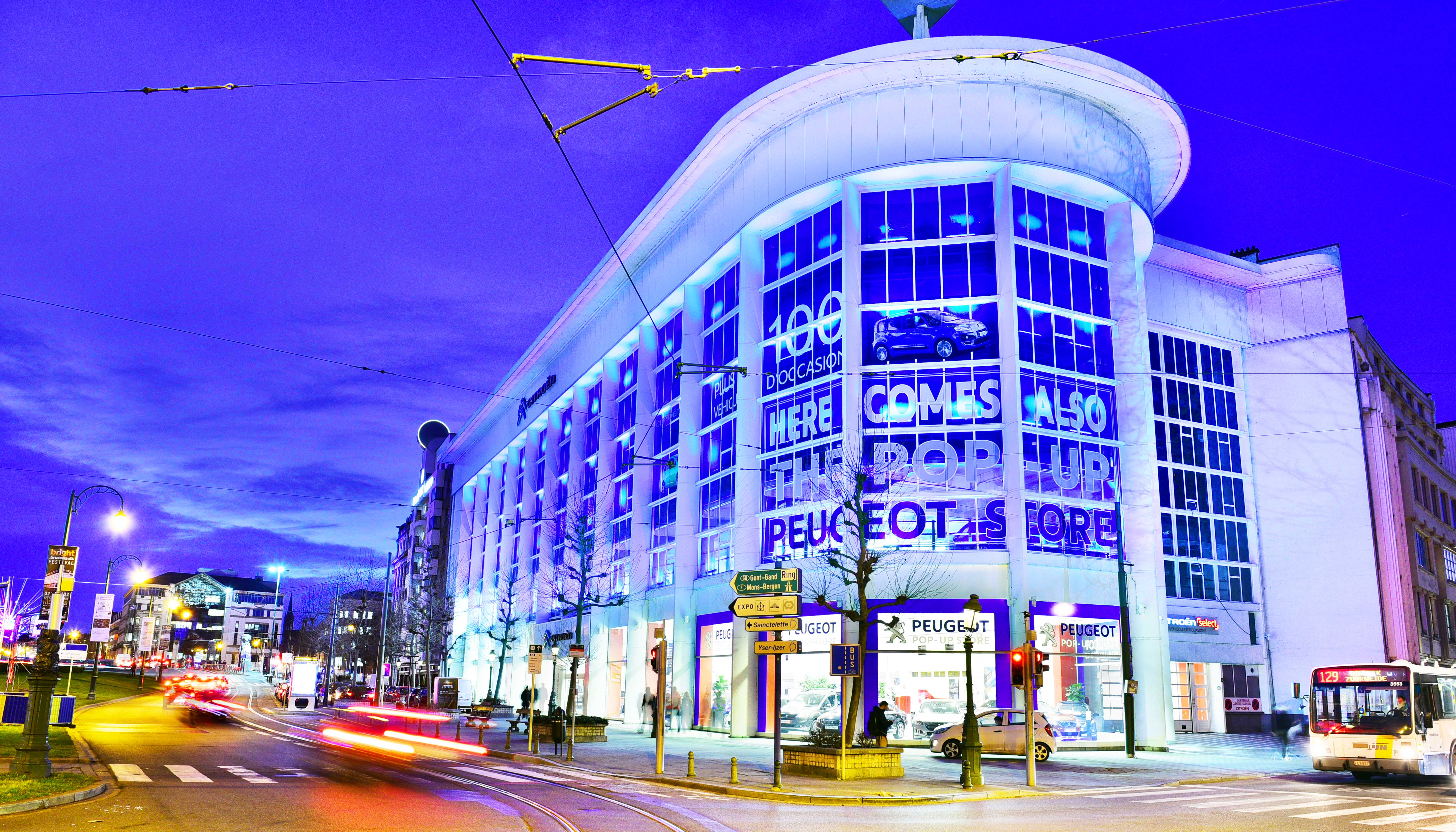 Citroën Belux Yser